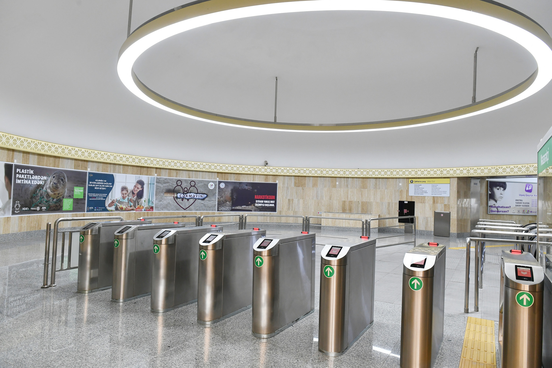 İlham Əliyev Bakı Metropoliteninin “Xətai” stansiyasında görülən işlərlə tanış olub